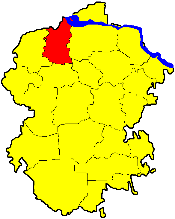 Моргаушский район на карте Чувашии